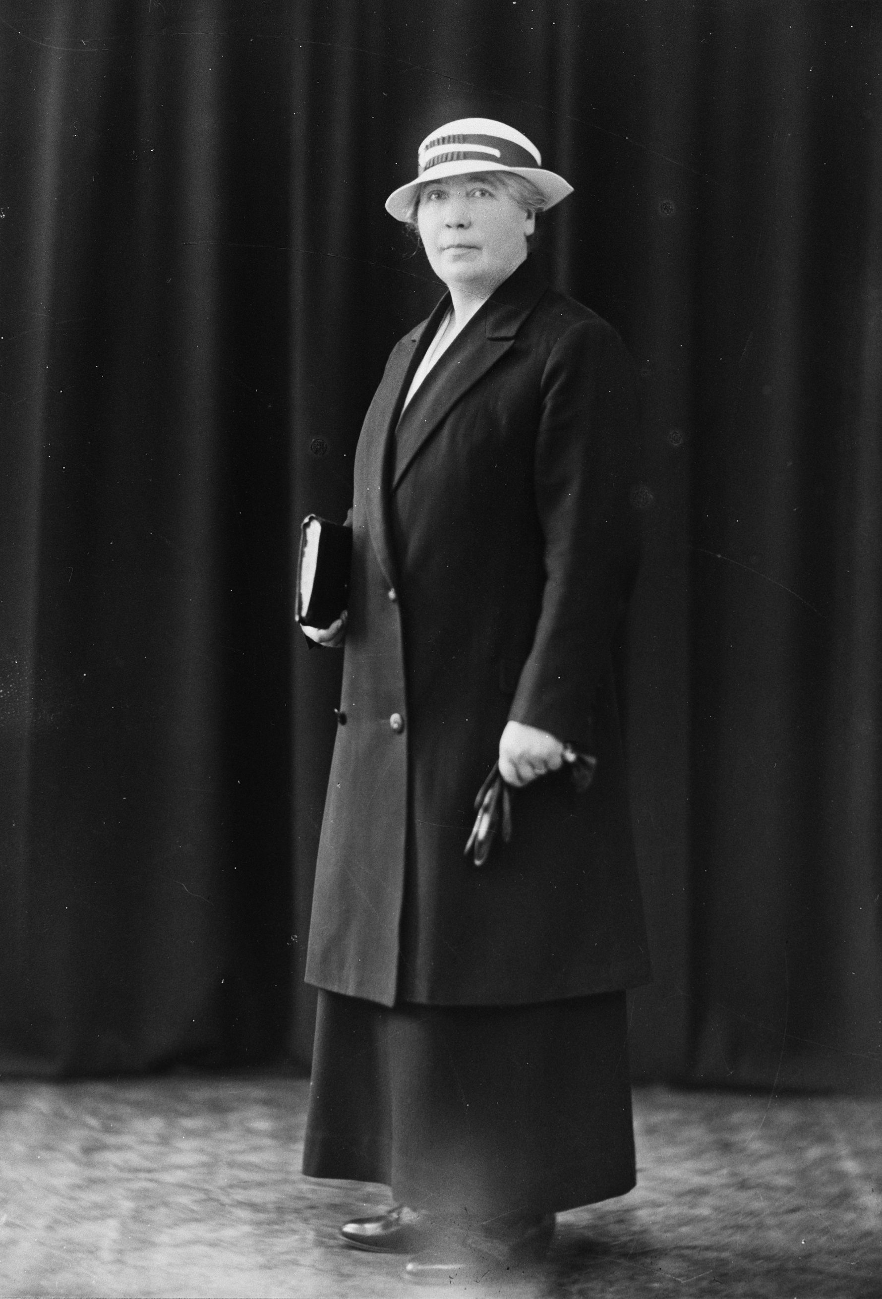 Bondejenta frå Vik i Sogn som vart ystegründer i hovudstaden. Foto: Borgens Atelier/Fylkesarkivet i Sogn og Fjordane, ca 1910-1920